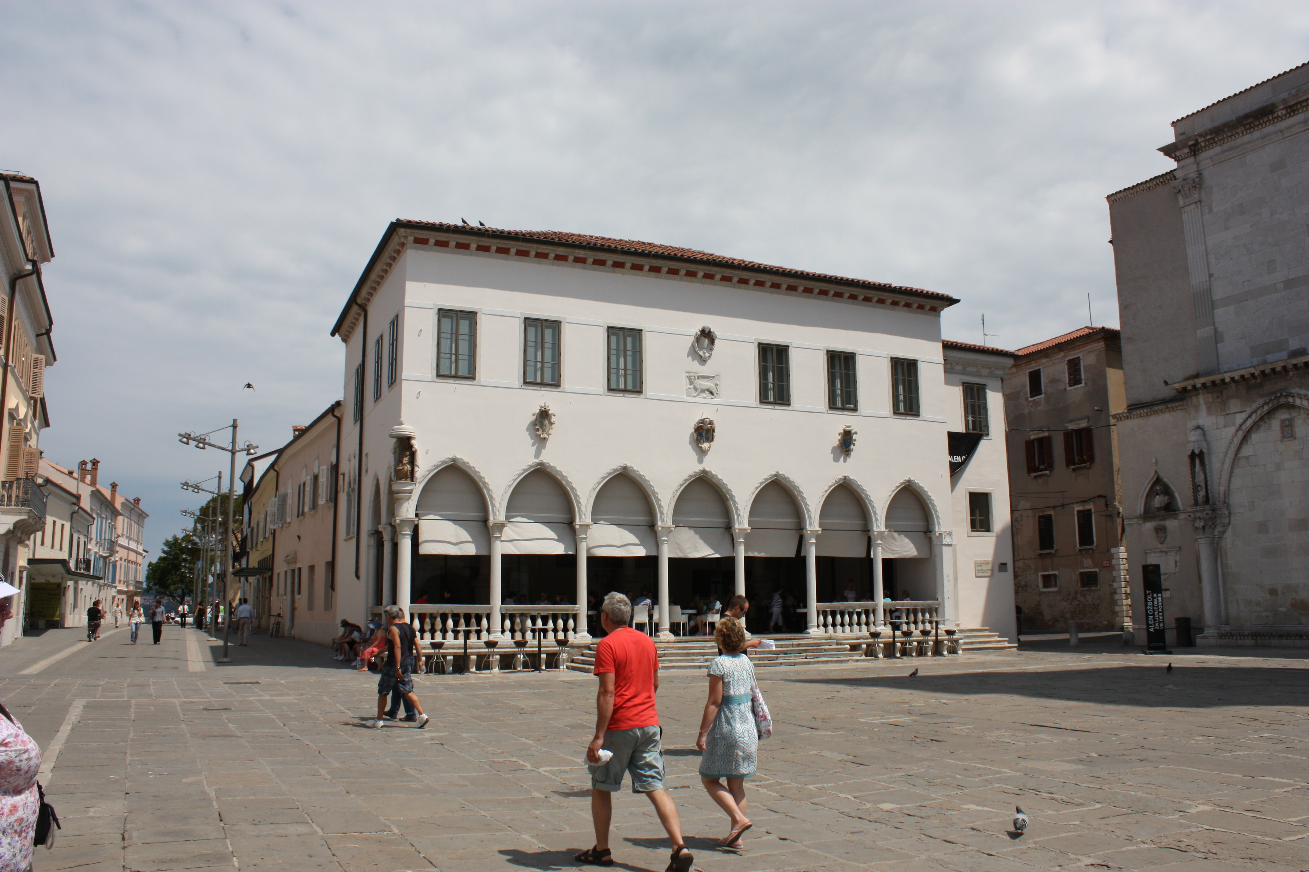 Main square